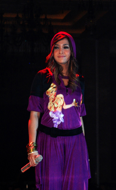 Maia Estianty